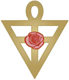 Símbolo geométrico simple